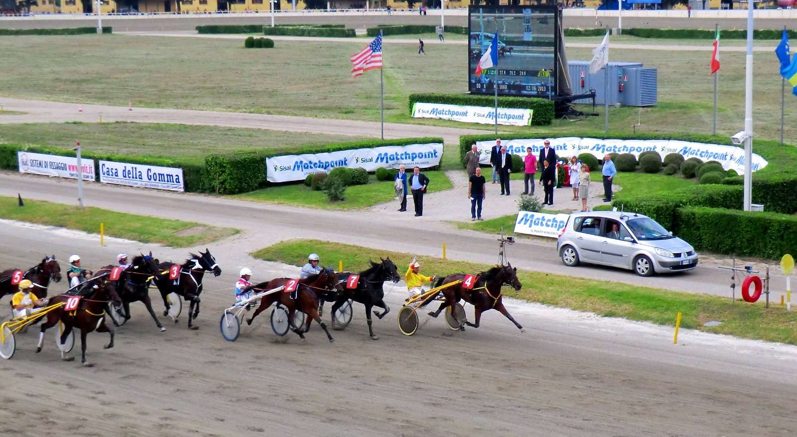 Foto scattata durante le gare - Gran Premio della Repubblica all'Ippodromo dell'Arcoveggio, Bologna.